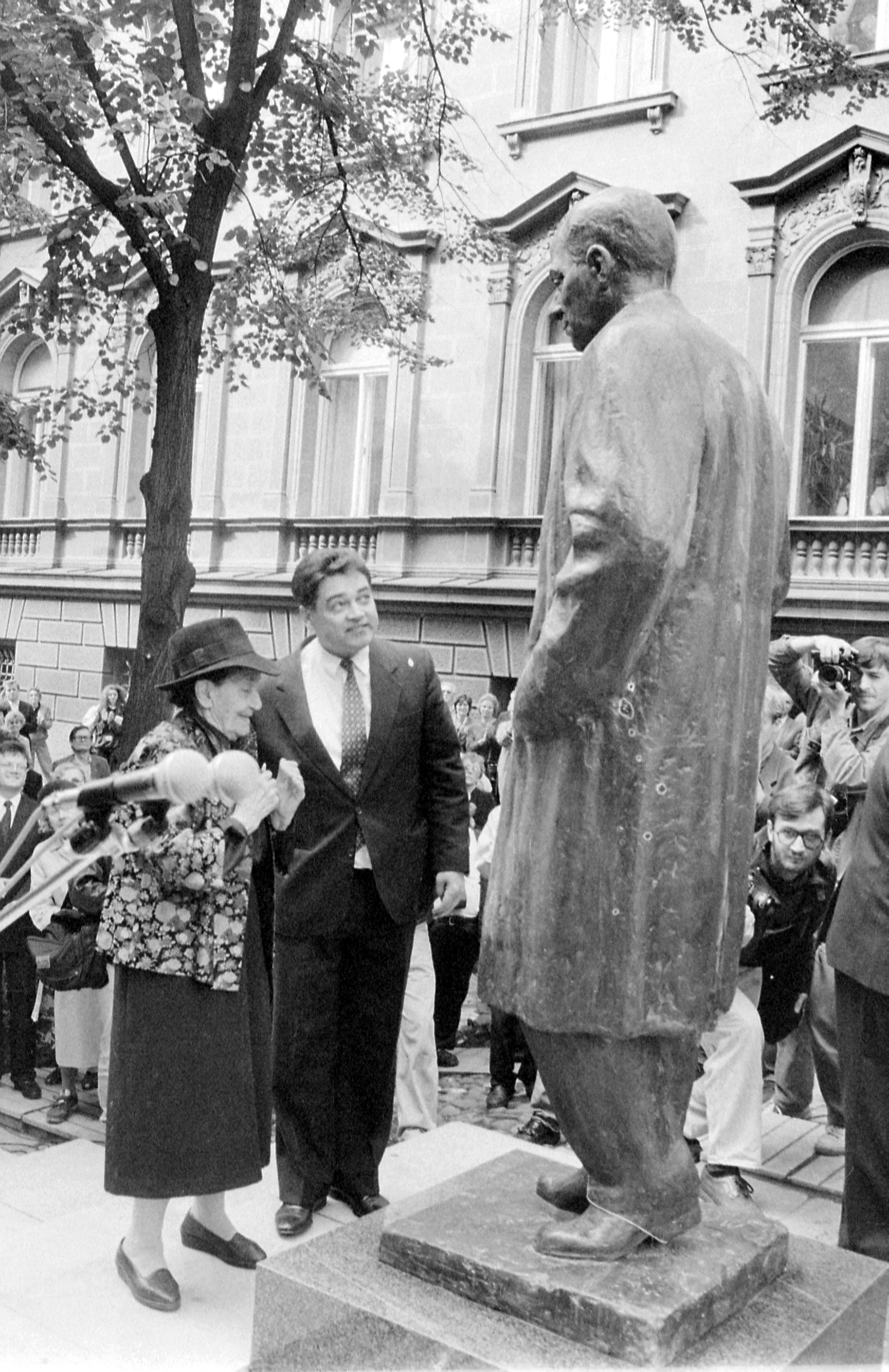 Gradonačelnik Beograda dr Milorad Unković i pesnikinja Desanka Maksimović otkrivaju spomenik Ivi Andriću - rad vajara Milenka Mandića - povodom jednog veka od rođenja pisca 1992, na Andrićevom vencu, ispred današnjeg Spomen-muzeja Ive Andrića. Autor fotografije Stevan Kragujević (po odobrenju Tanje Kragujević)